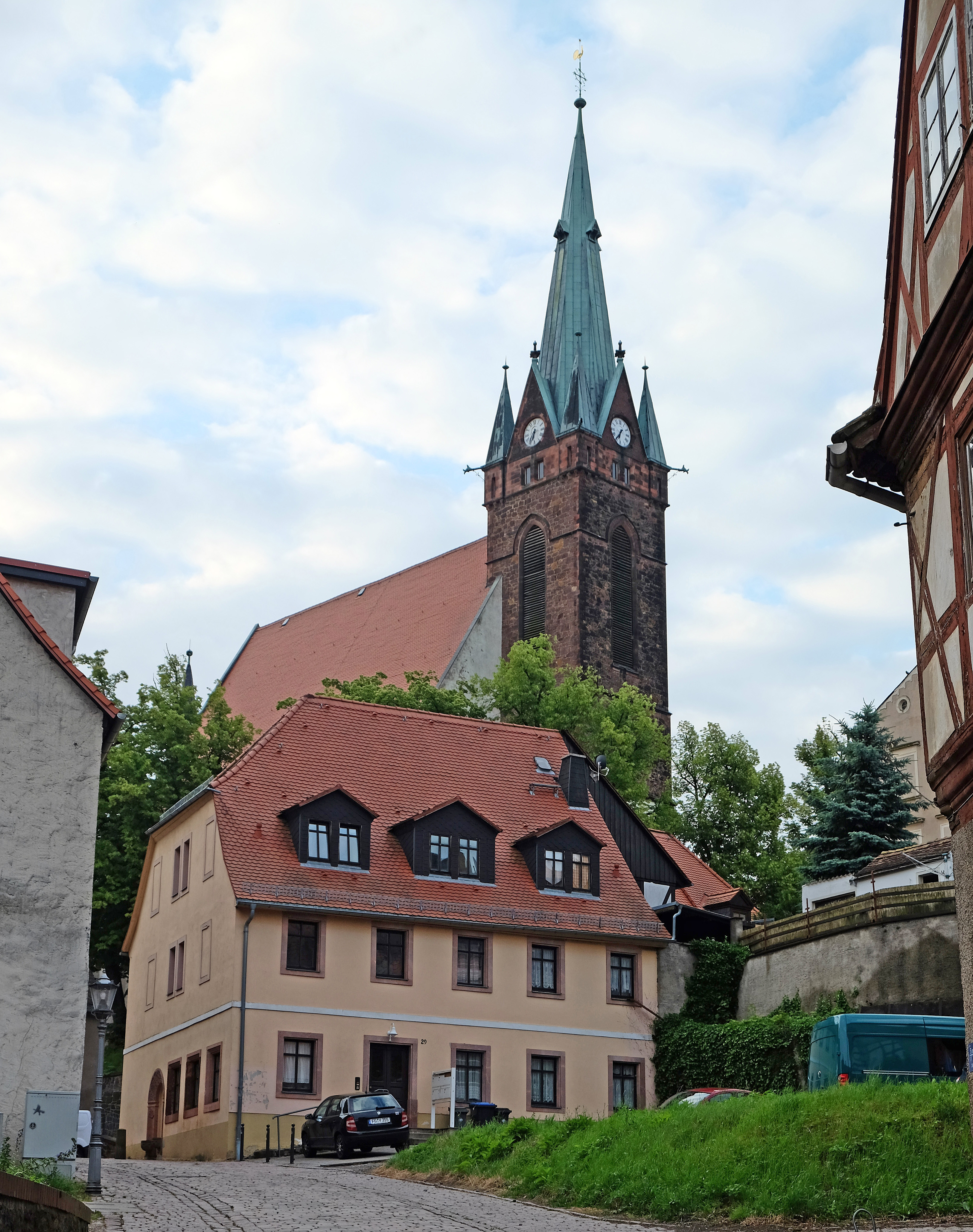 Leisnig, Blick vom Schlossberg zur Kirche St. Matthäi